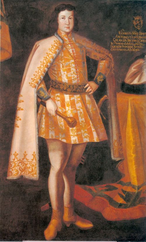 Galánthai gróf Esterházy Antal (1676. február 3. – Rodostó, 1722. augusztus 8.) kuruc tábornagy.